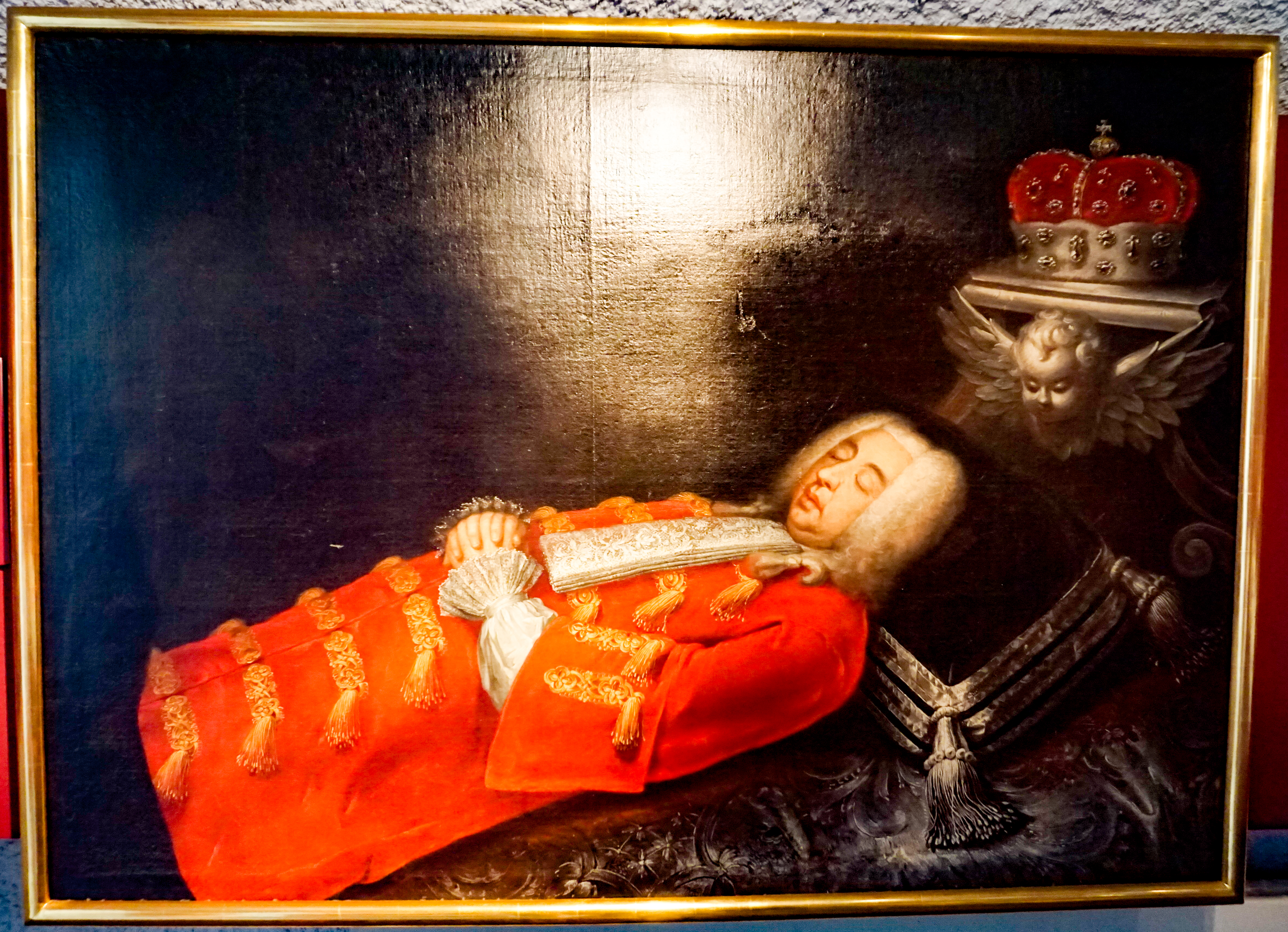 Gruft des Hauses Württemberg im Alten Schloss, Stuttgart: Herzog Eberhard Ludwig von Württemberg. Öl auf Leinwand, Inv. Nr. E 2310